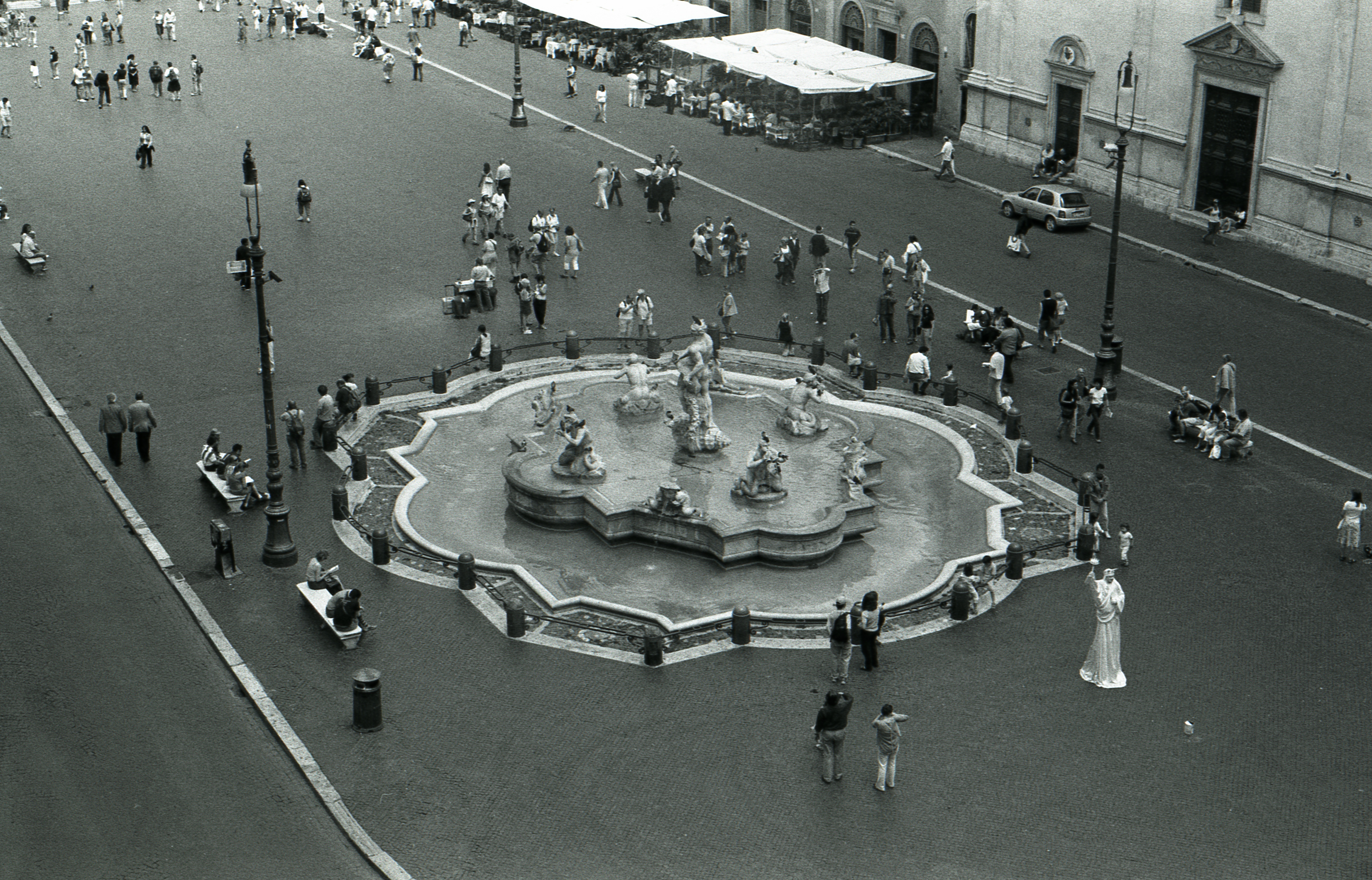 Roma, Italia